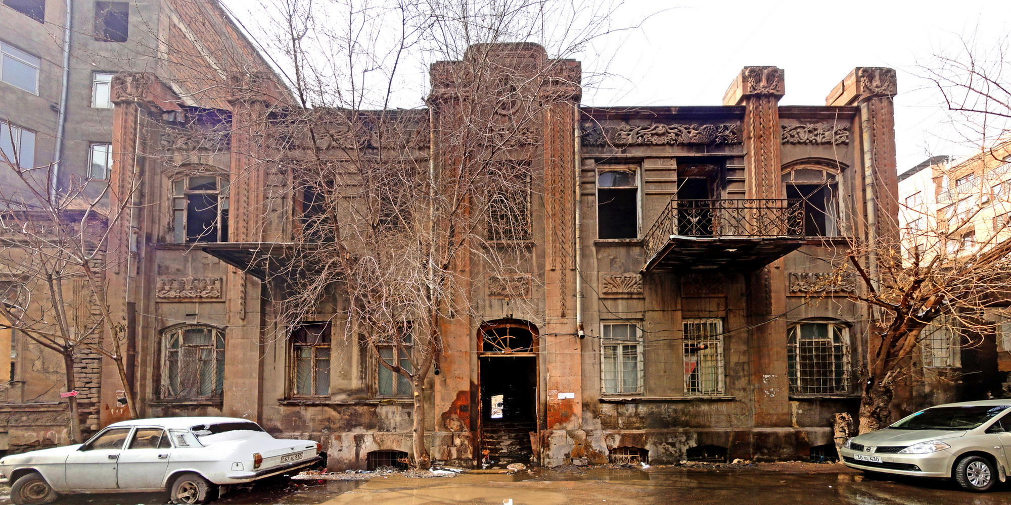 Yerevan, House of Afrikyans